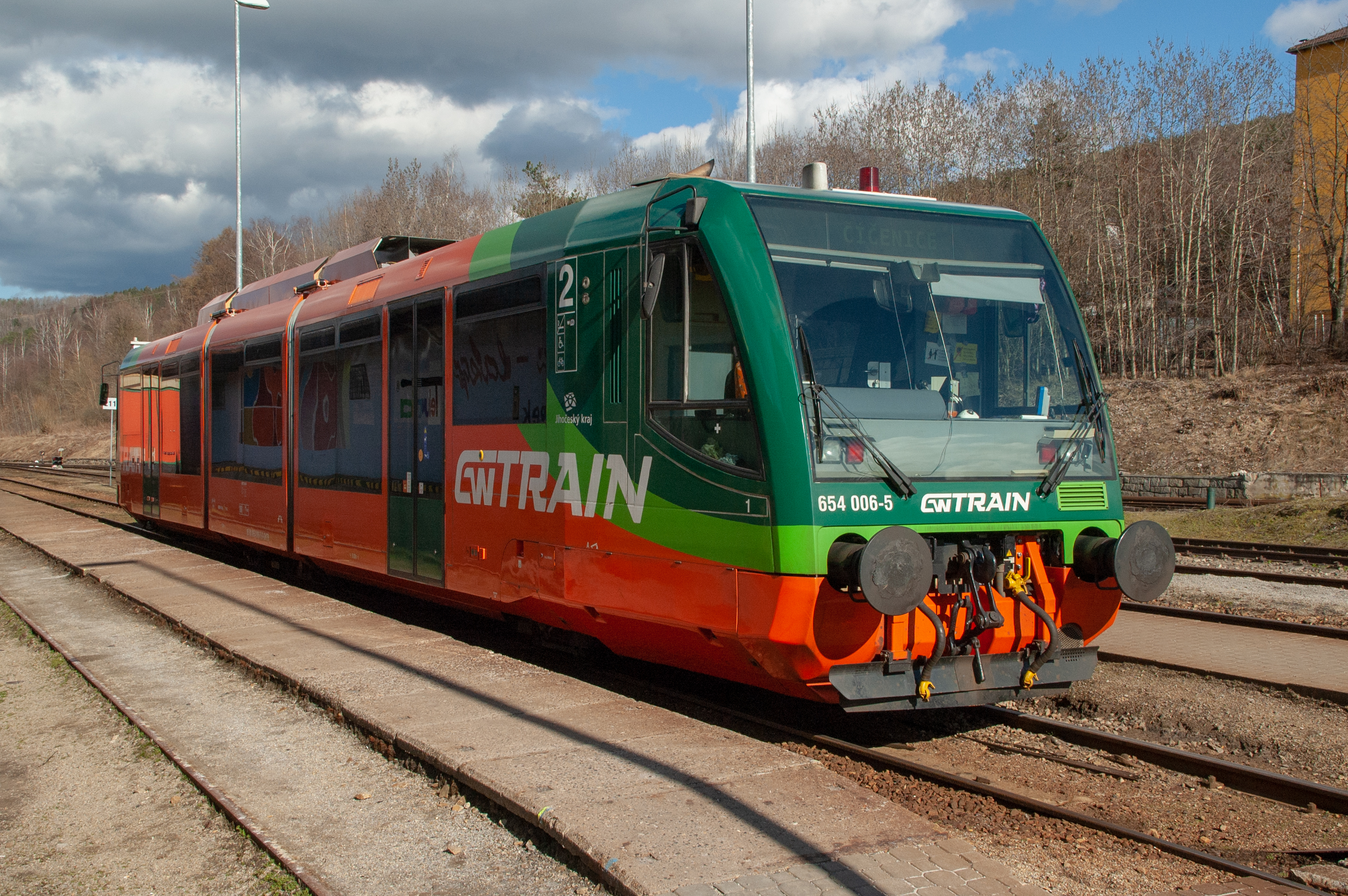 RegioSprinter GW Train Regio na nádraží v Prachaticích